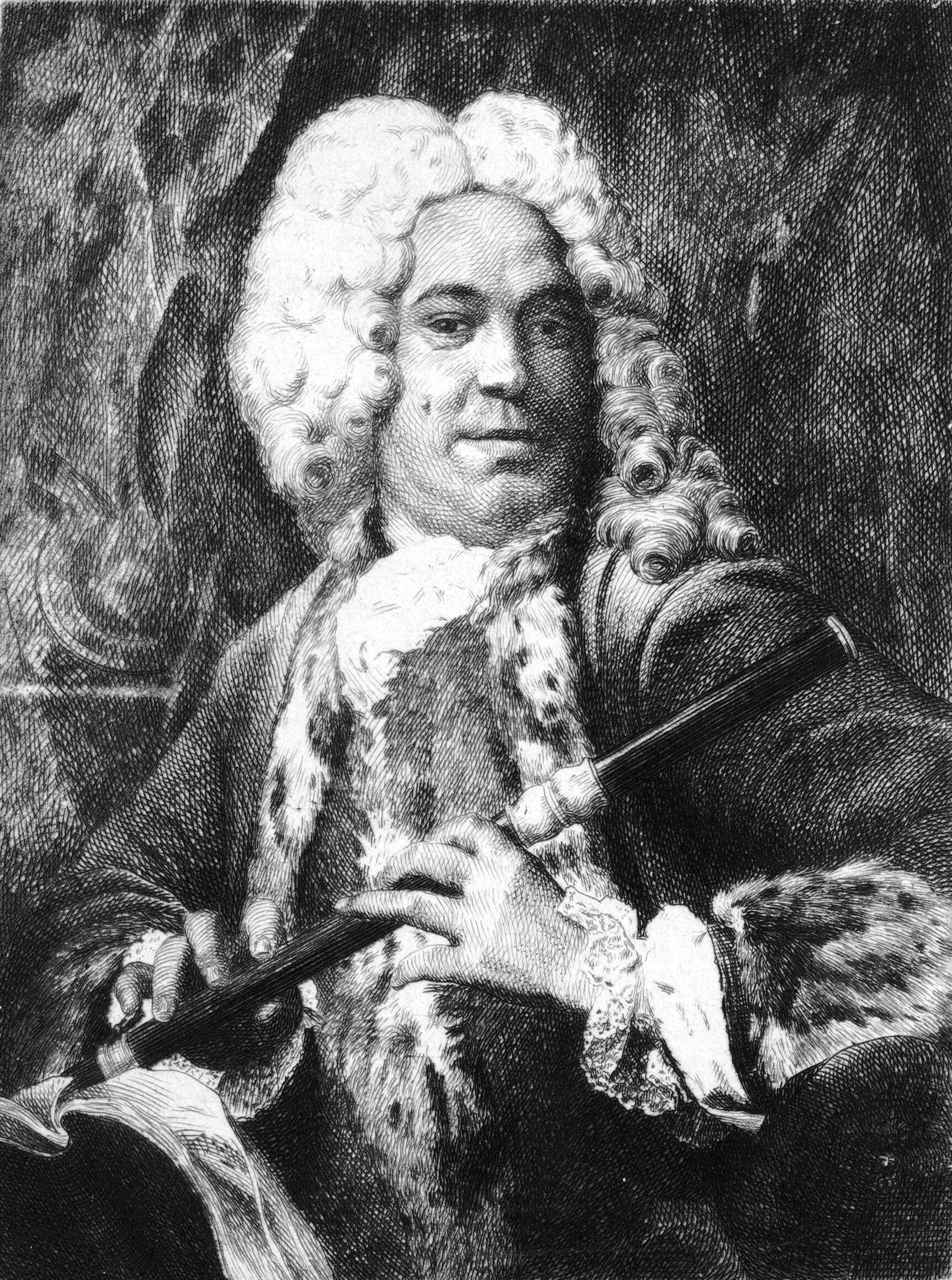 Portrait présumé de Michel de La Barre